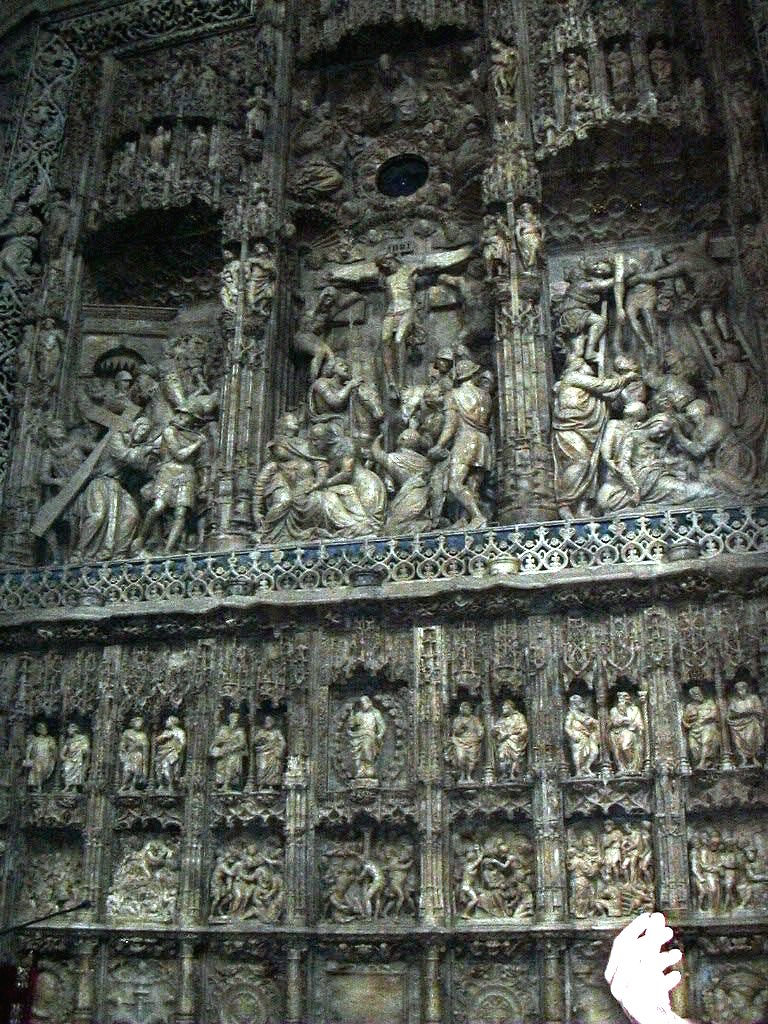 Huesca - Detalle del retablo mayor de la catedral